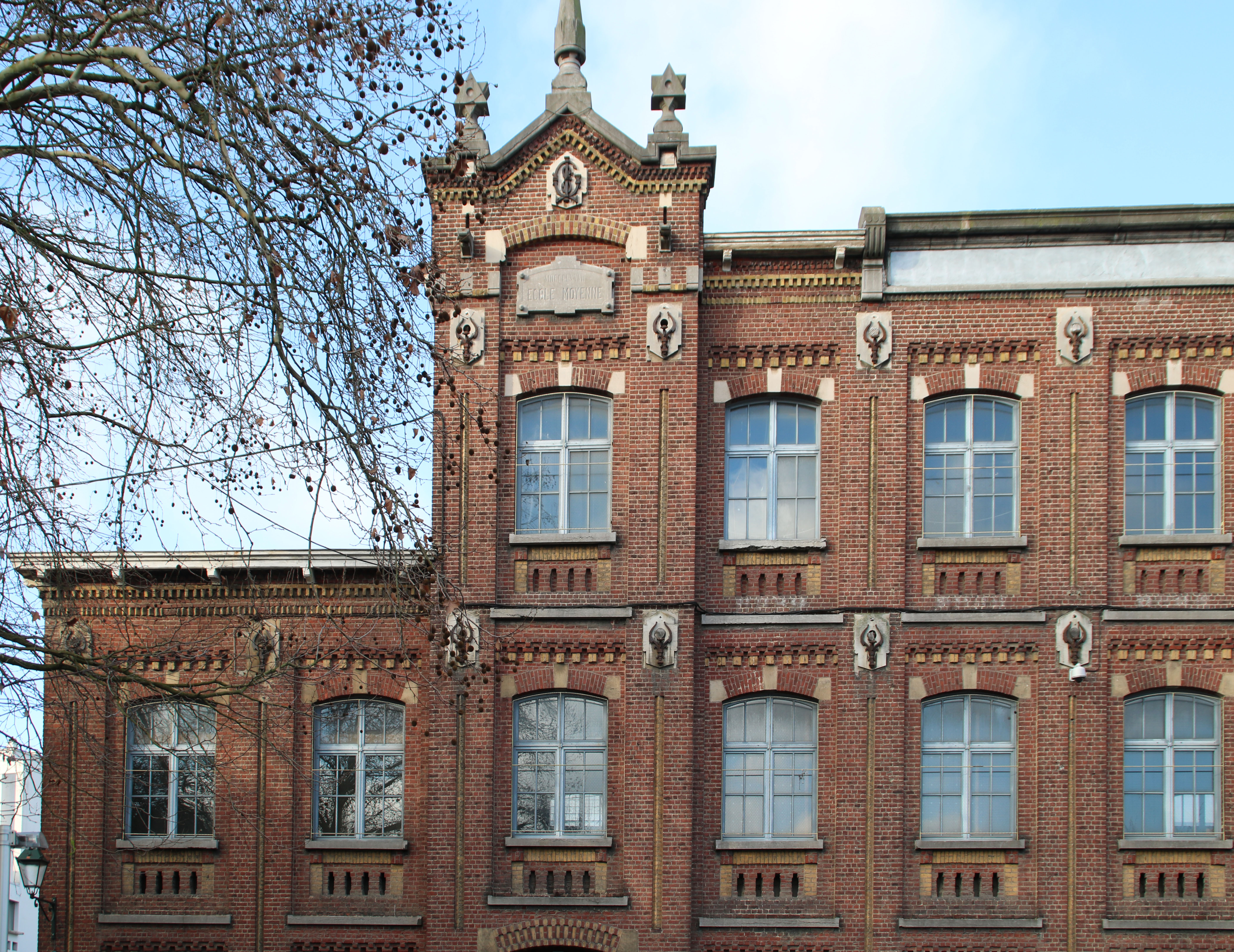 Athénée